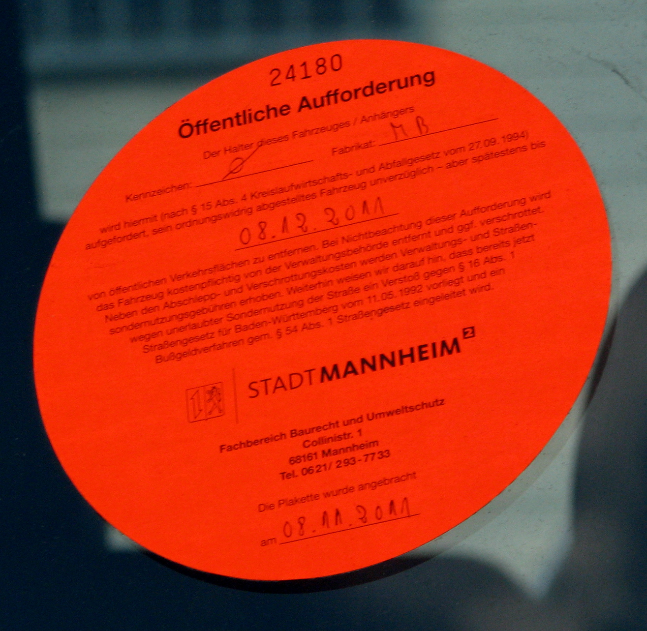 Öffentliche Aufforderung an einem geparkten PKW ohne Nummernschilder in Mannheim